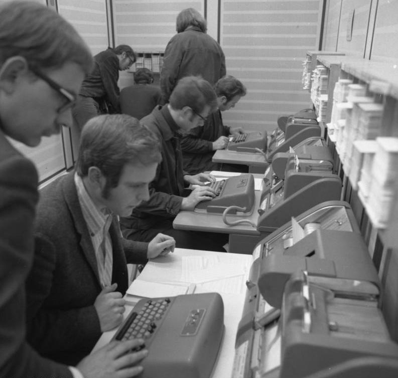 Technische Hochschule Aachen Rechenzentrum